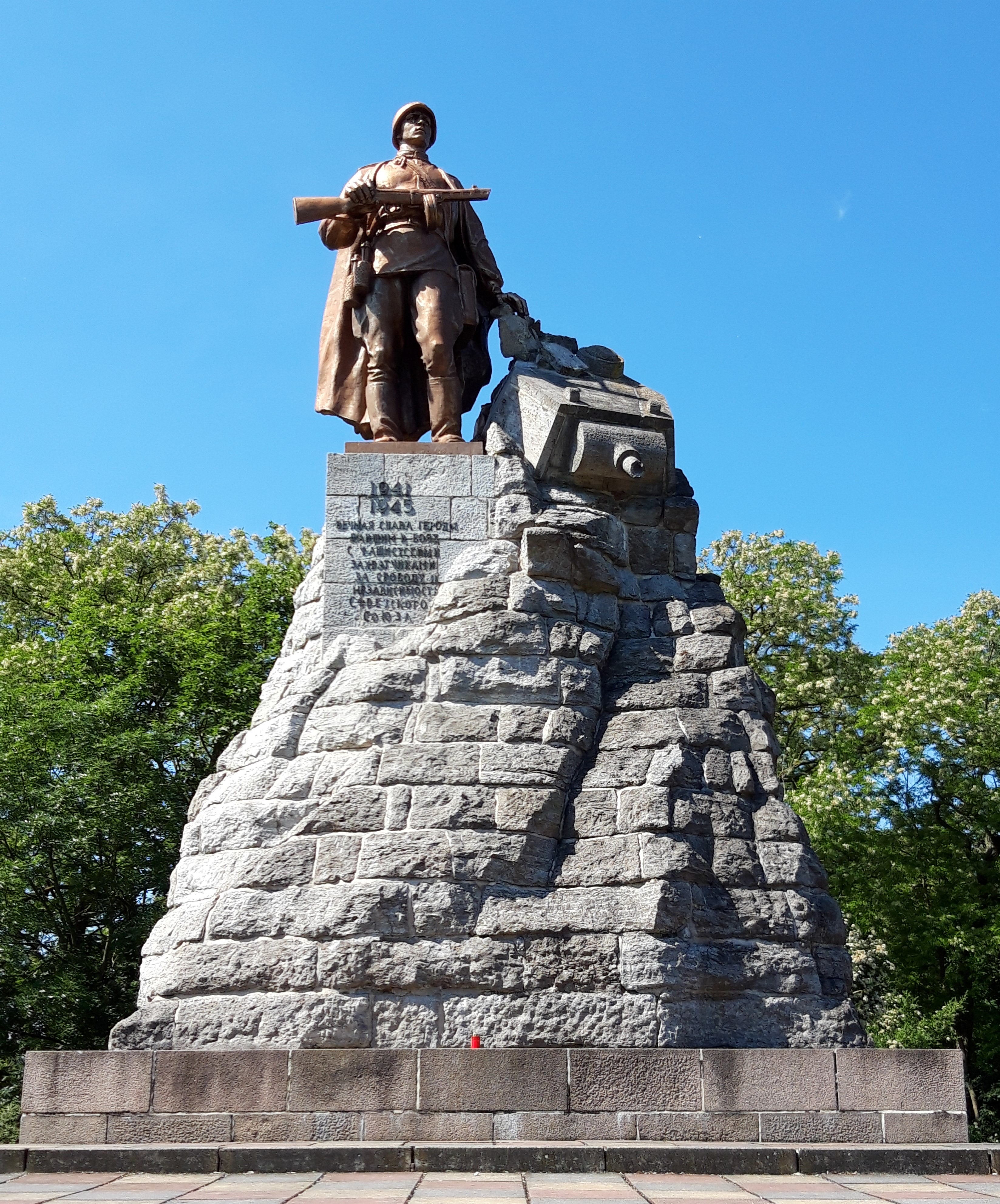 Sowjetisches Ehrenmal von L. Kerbel, Gedenkstätte Seelower Höhen